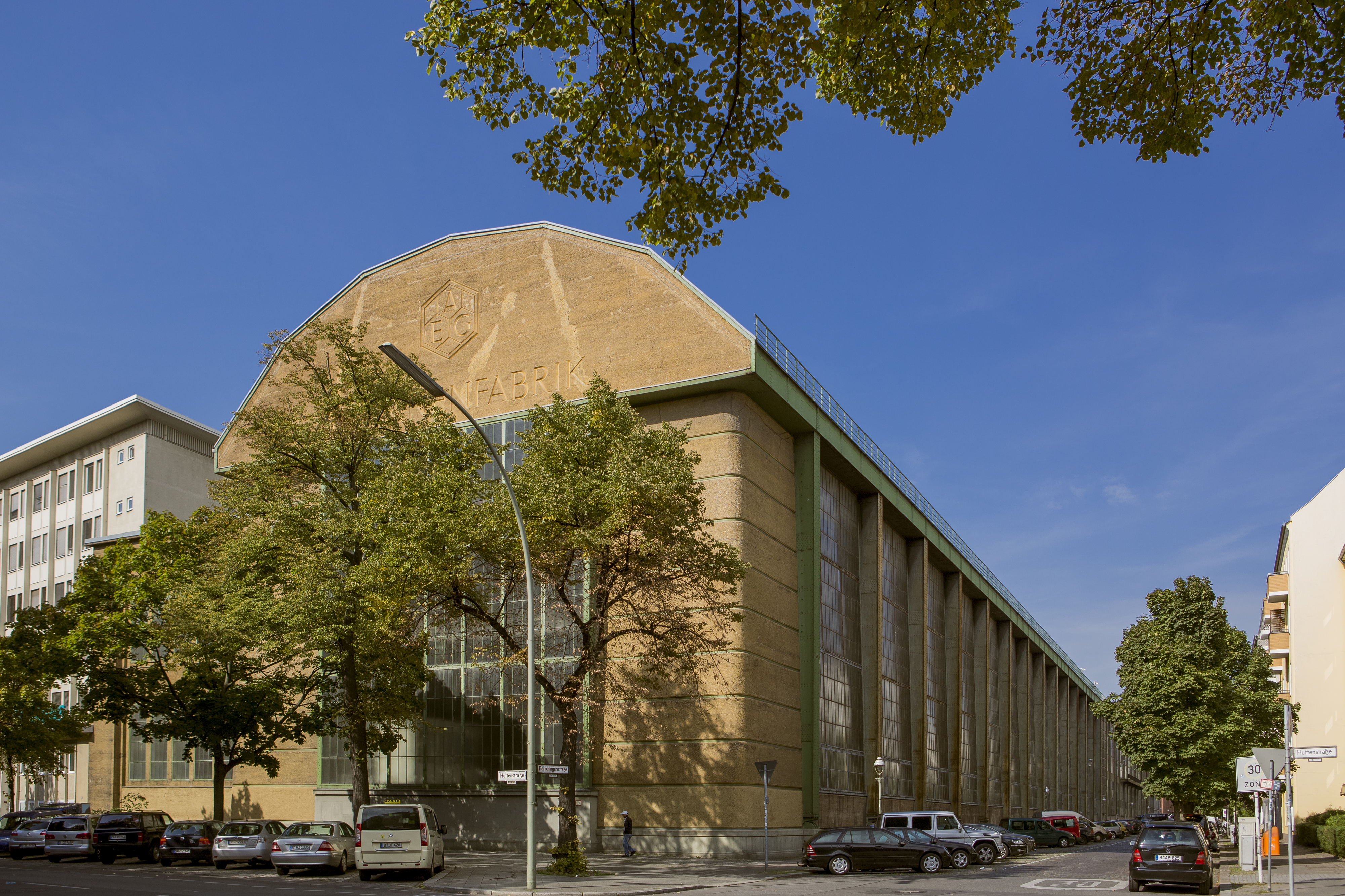 Union-Elektricitäts-Gesellschaft, später AEG-Turbinenfabrik Turbinenhalle von Peter Behrens Huttenstraße 12–16 BerlichingenstraßeThis is a photograph of an architectural monument.